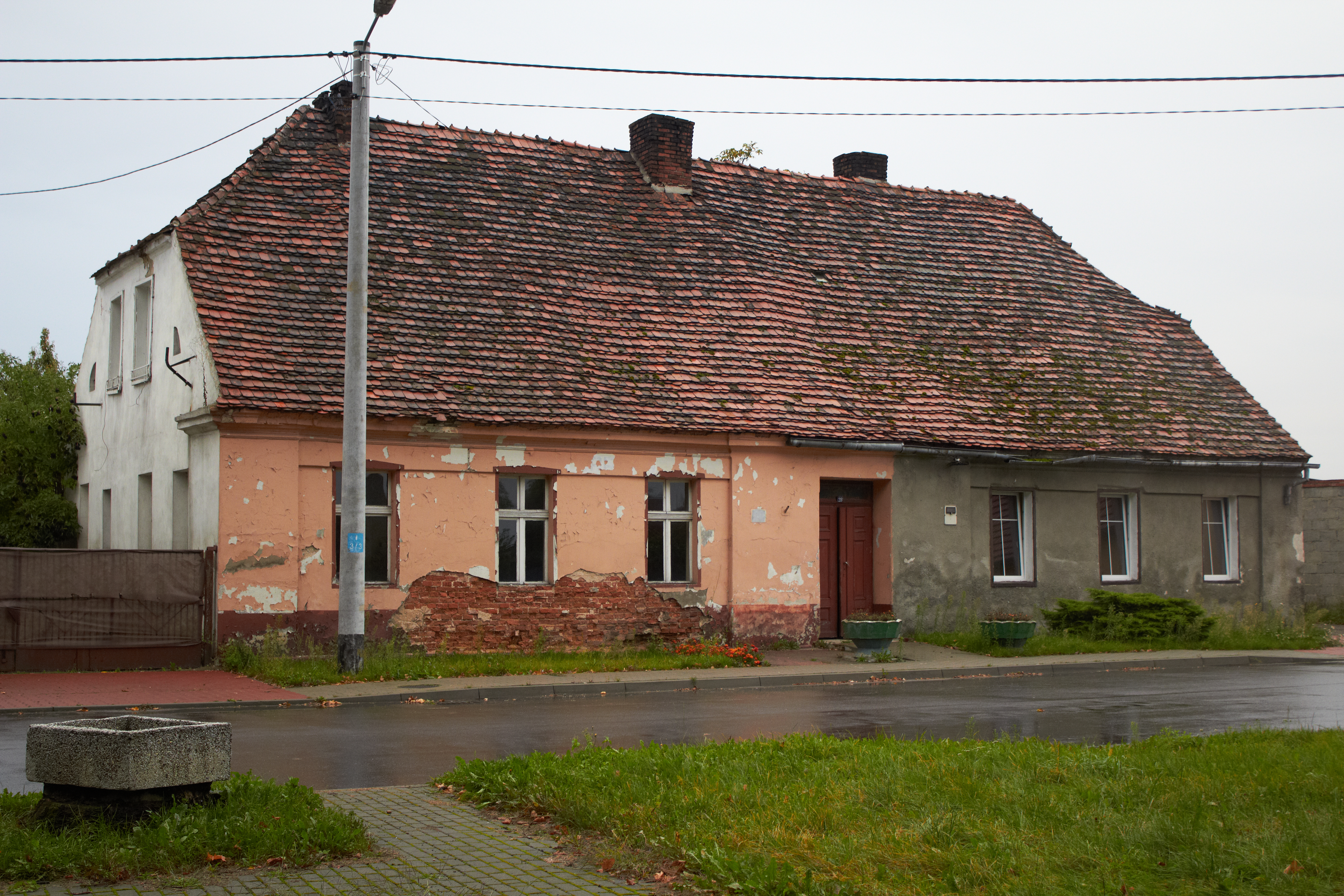 Mieszków, szkoła, ob. dom